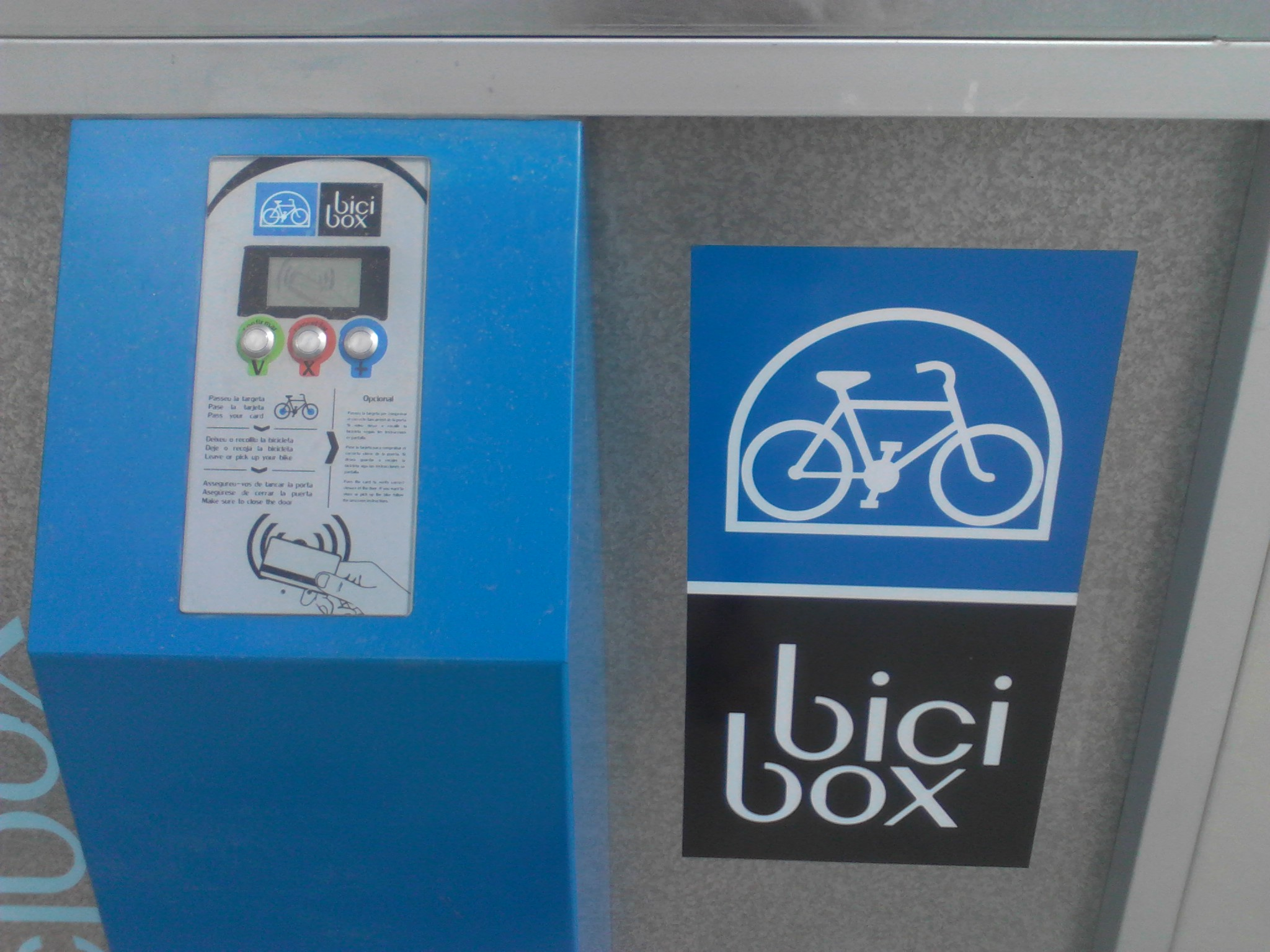 Bicibox del barri de Bellvitge de l'Hospitalet de Llobregat.